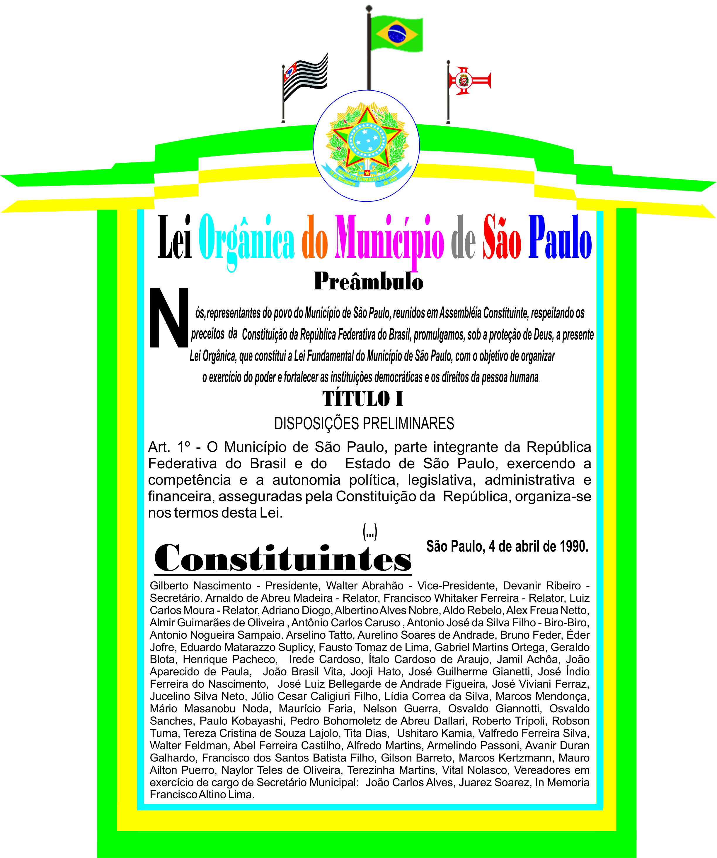 Portal ornamental com o preâmbulo, o artigo 1 e os vereadores constituintes da Lei Orgânica do Município de São Paulo, capital do estado de São Paulo.